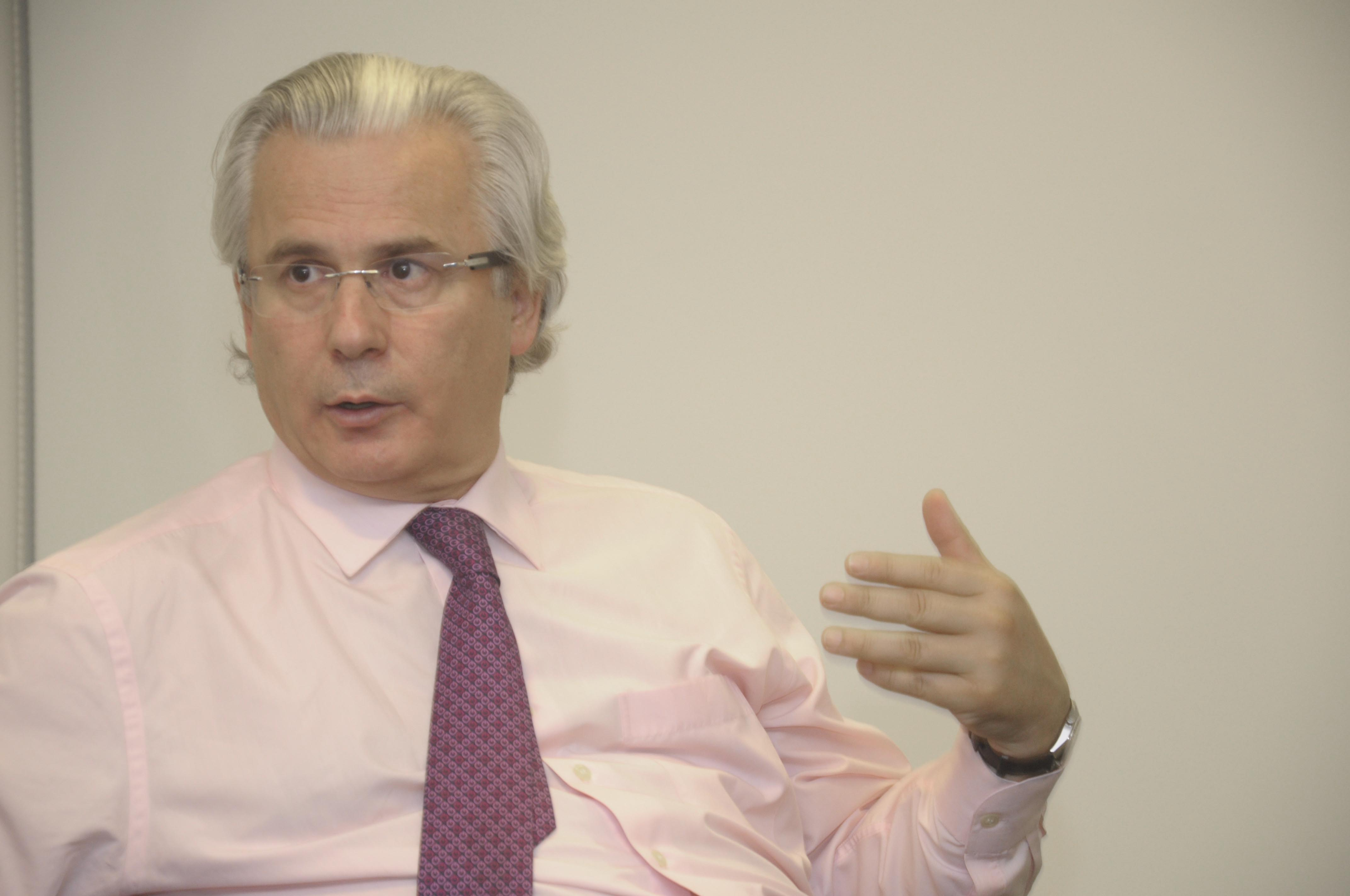 La Fundación Internacional Baltasar Garzón (FIBGAR) que conduce el ex juez español Baltasar Garzón, la Fundación Octubre que preside Víctor Santa María, y la Universidad Metropolitana para la Educación y el Trabajo (UMET), firmaron este miércoles un convenio de cooperación educativa en donde se comprometieron a elaborar una propuesta de investigación alrededor de cinco ejes: pueblos originarios, derecho ambiental, jurisdicción universal, migración y resolución y mediación de conflictos. Mi sitio